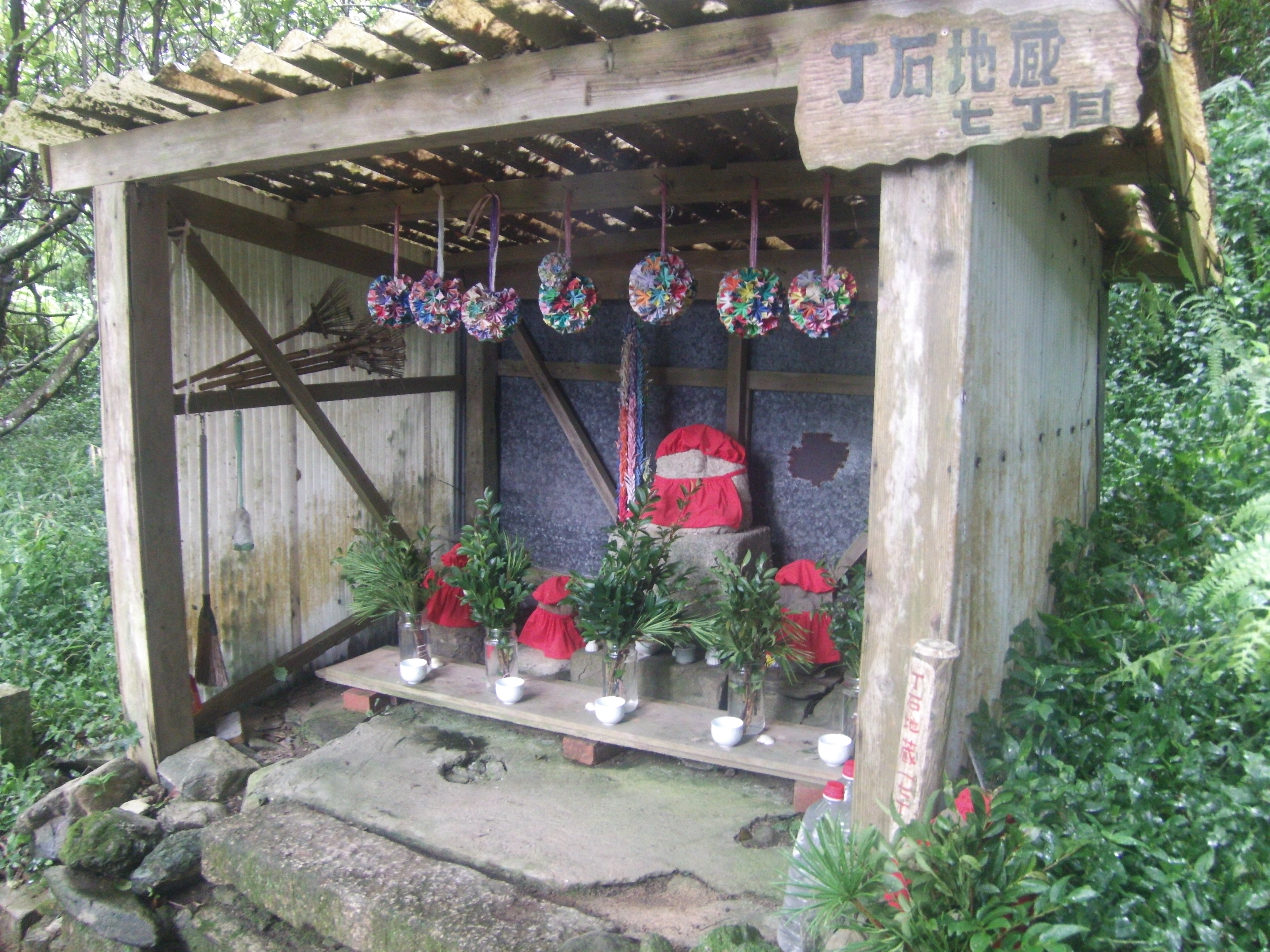 熊野古道・紀伊路の藤白坂の距離を示す地蔵尊を用いた丁石、七丁目の地蔵像は大きめ